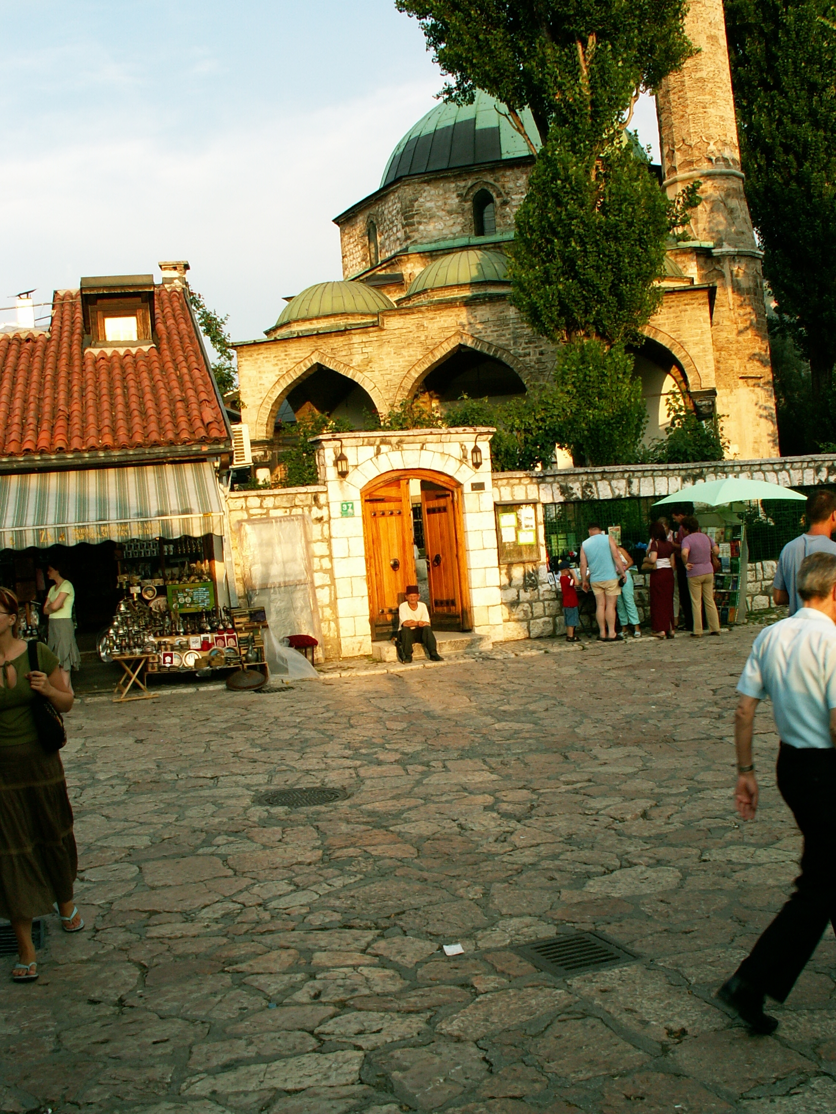 Sarajevo